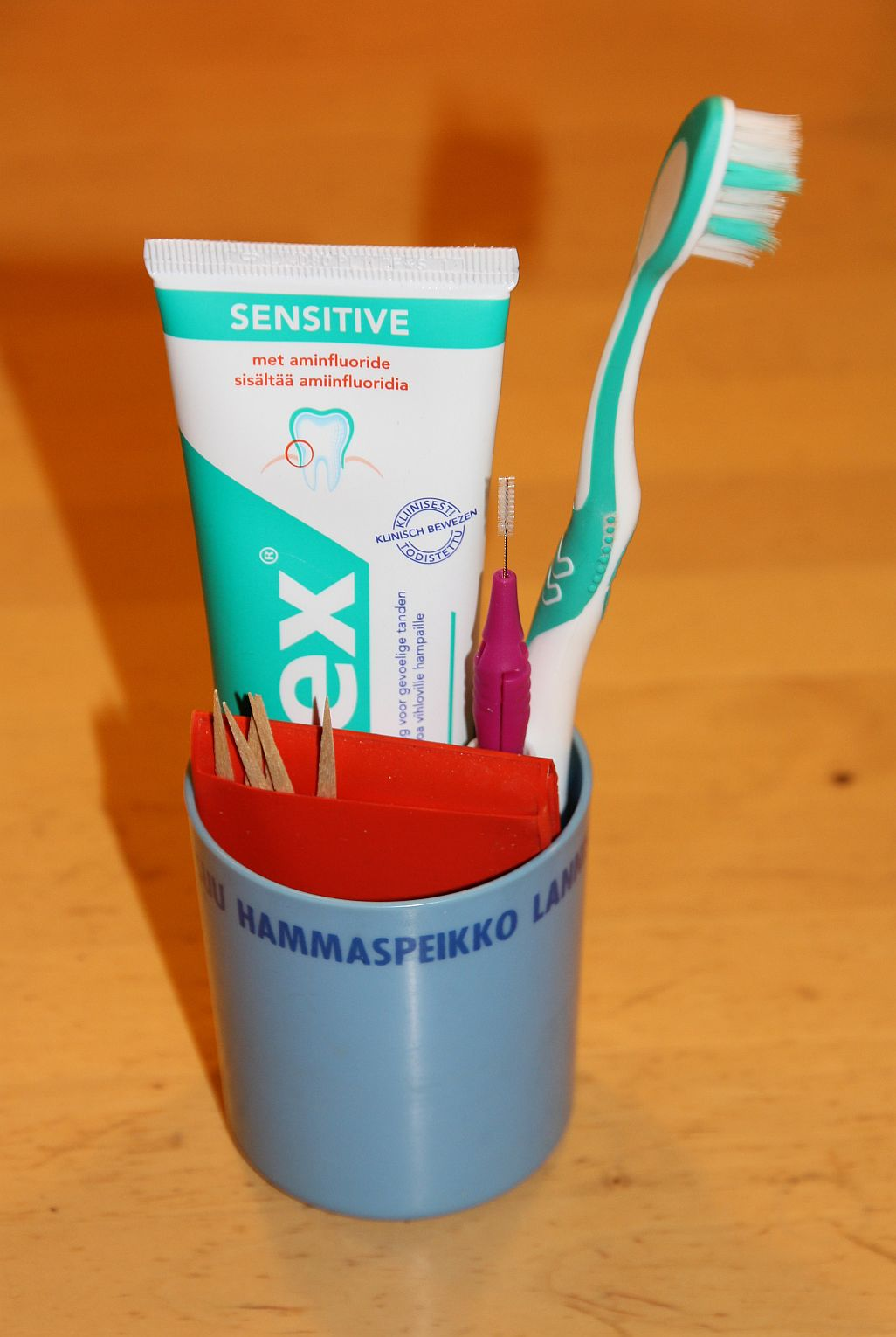 Esimerkki lapsille 1960-...1980-luvuilla hampaanhoidon valistustarkoituksessa Suomessa jaetusta hampaidenpesumukista uudempine hampaidenpesutarpeineen. Mukiin on painettu loru: Harjaa hampaat huuhdo suu hammaspeikko lannistuu. Mukin sisällä hammastahnapakkaus, -harja, -väliharja ja -tikkuja.